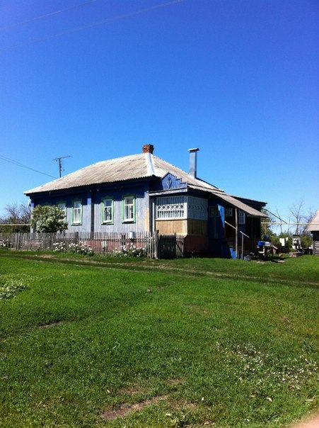 Дом №4 по улице Бутырки в с. 1-ая Иноковка